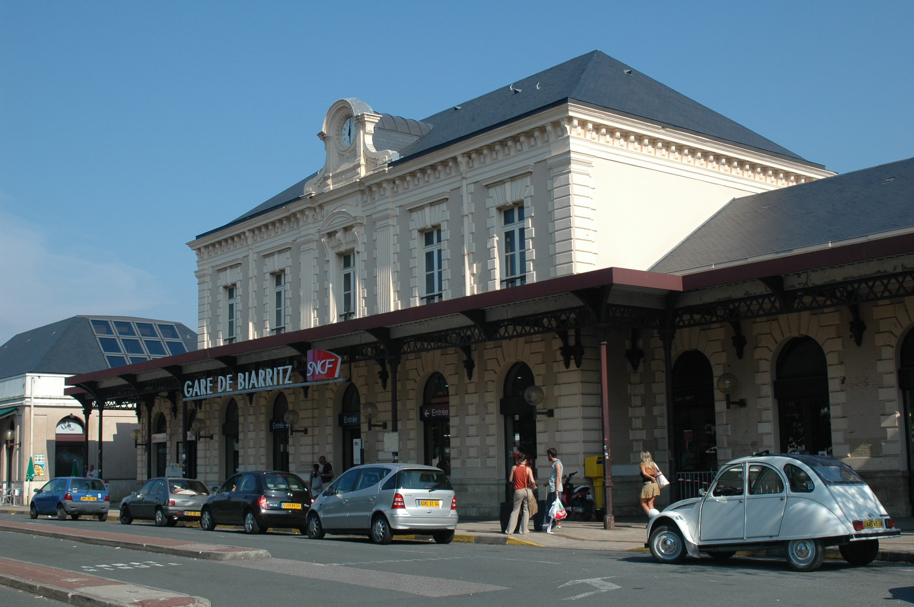 Biarritz, la gare SNCF. Photo prise le 17/07/2006 par Harrieta171